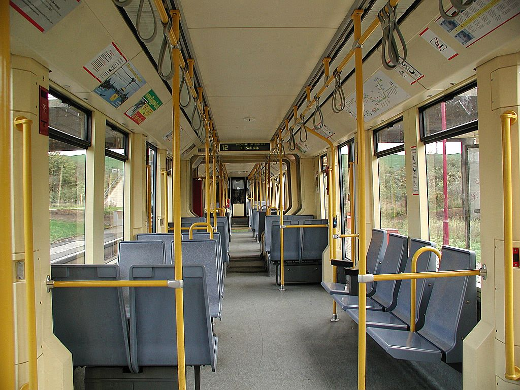 Innenraum eines K-4000-Niederflurwages der KVB